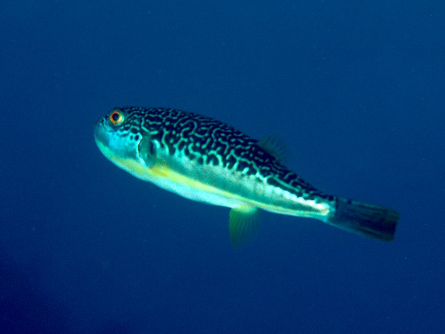 ムシフグ Takifugu exascurus